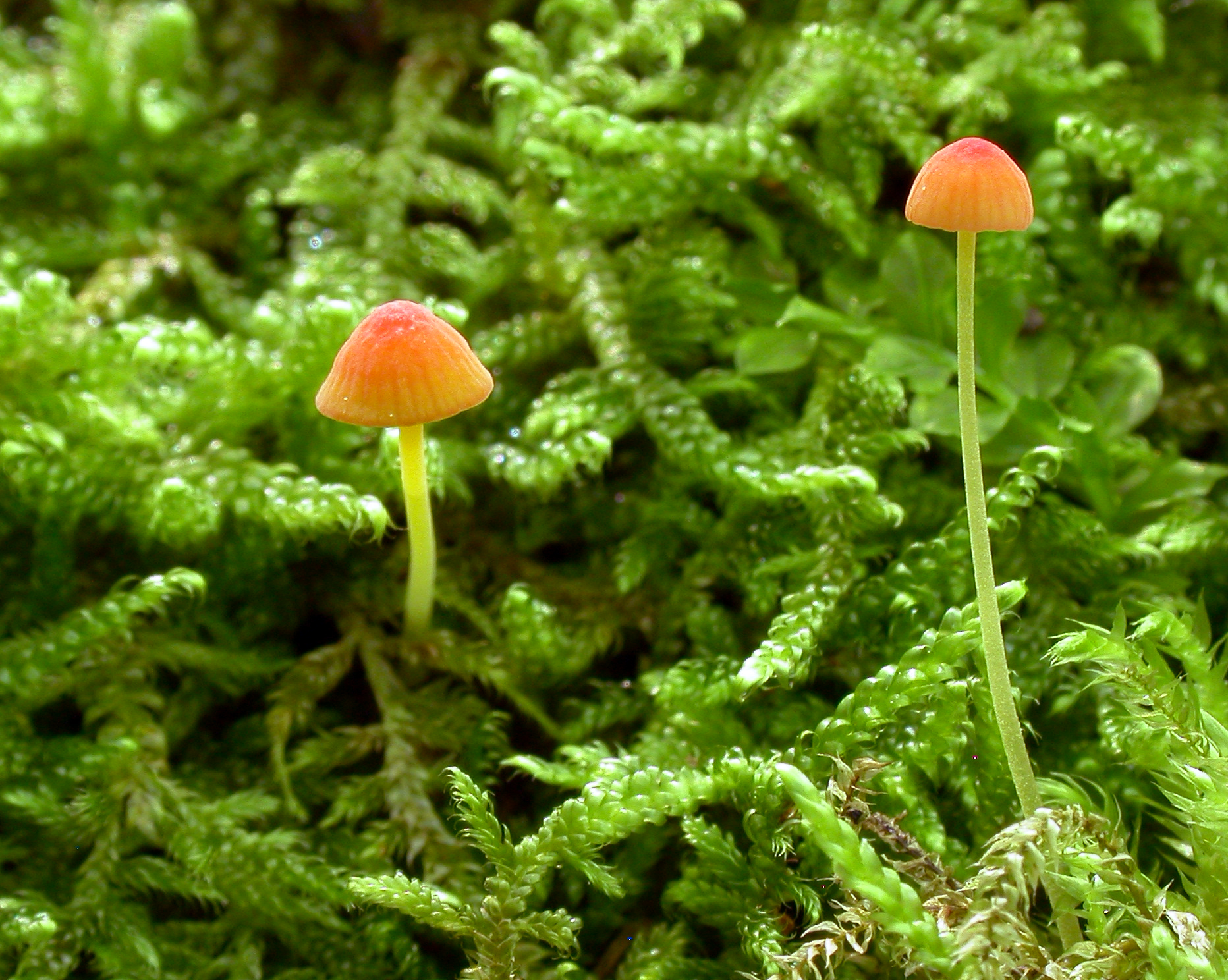 Sopparten raud gulfothette (Mycena acicula).